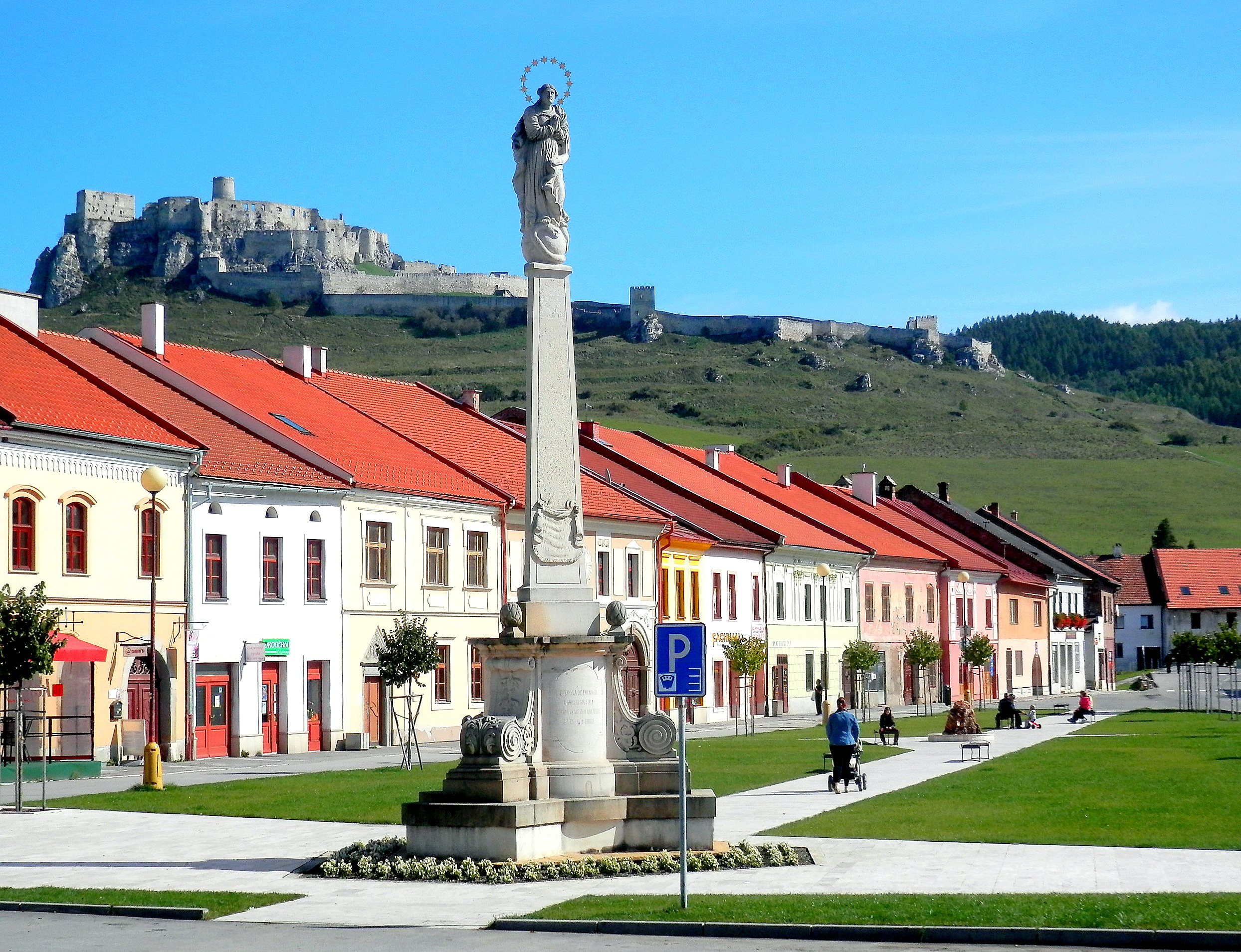 V pozadí Spišský hrad. Mariánske námestie, pamiatková rezervácia. Mariánsky stĺp so sochou Immaculaty, Spišské Podhradie.